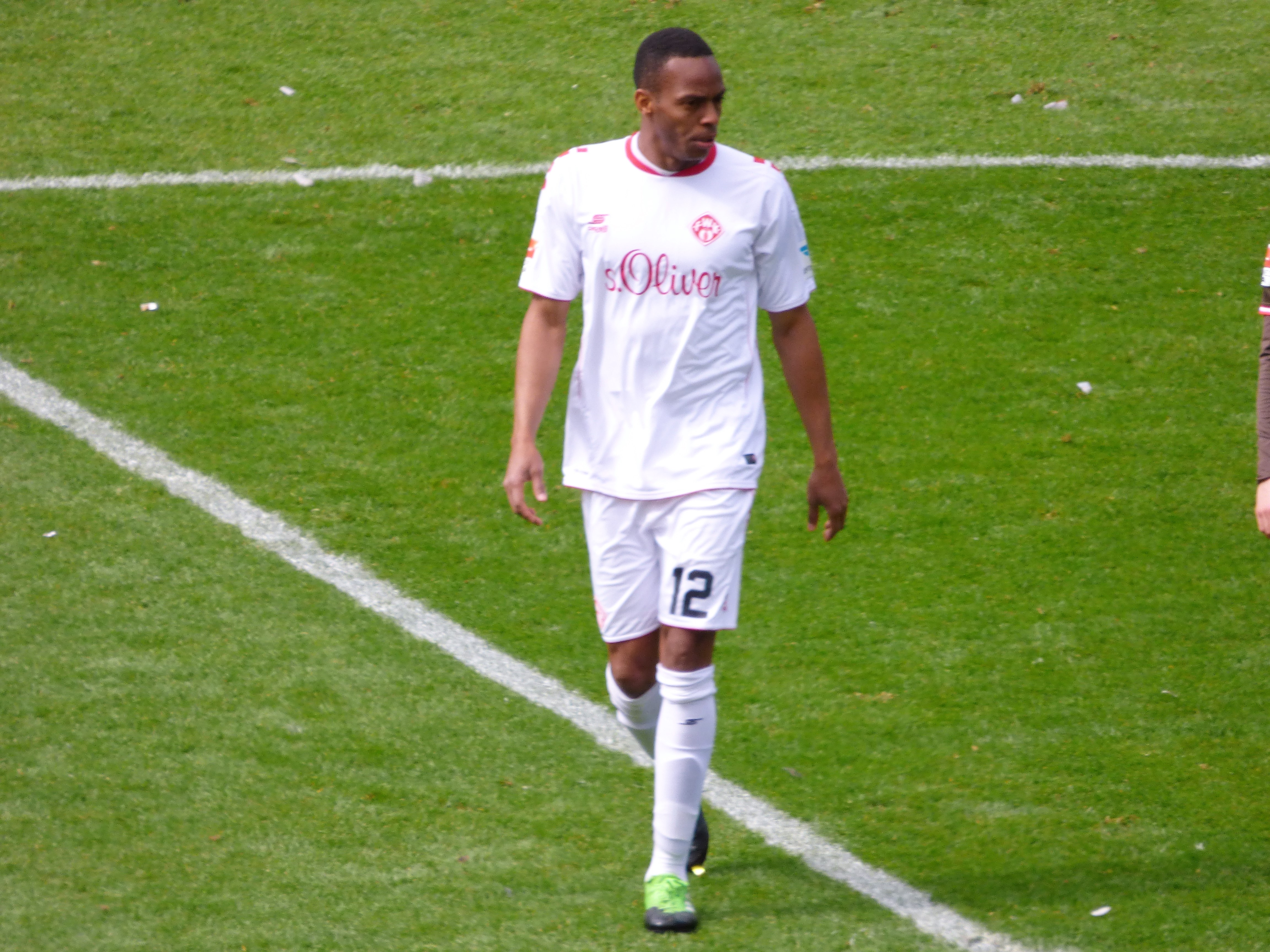 Júnior Díaz im Trikot vom SV Sandhausen